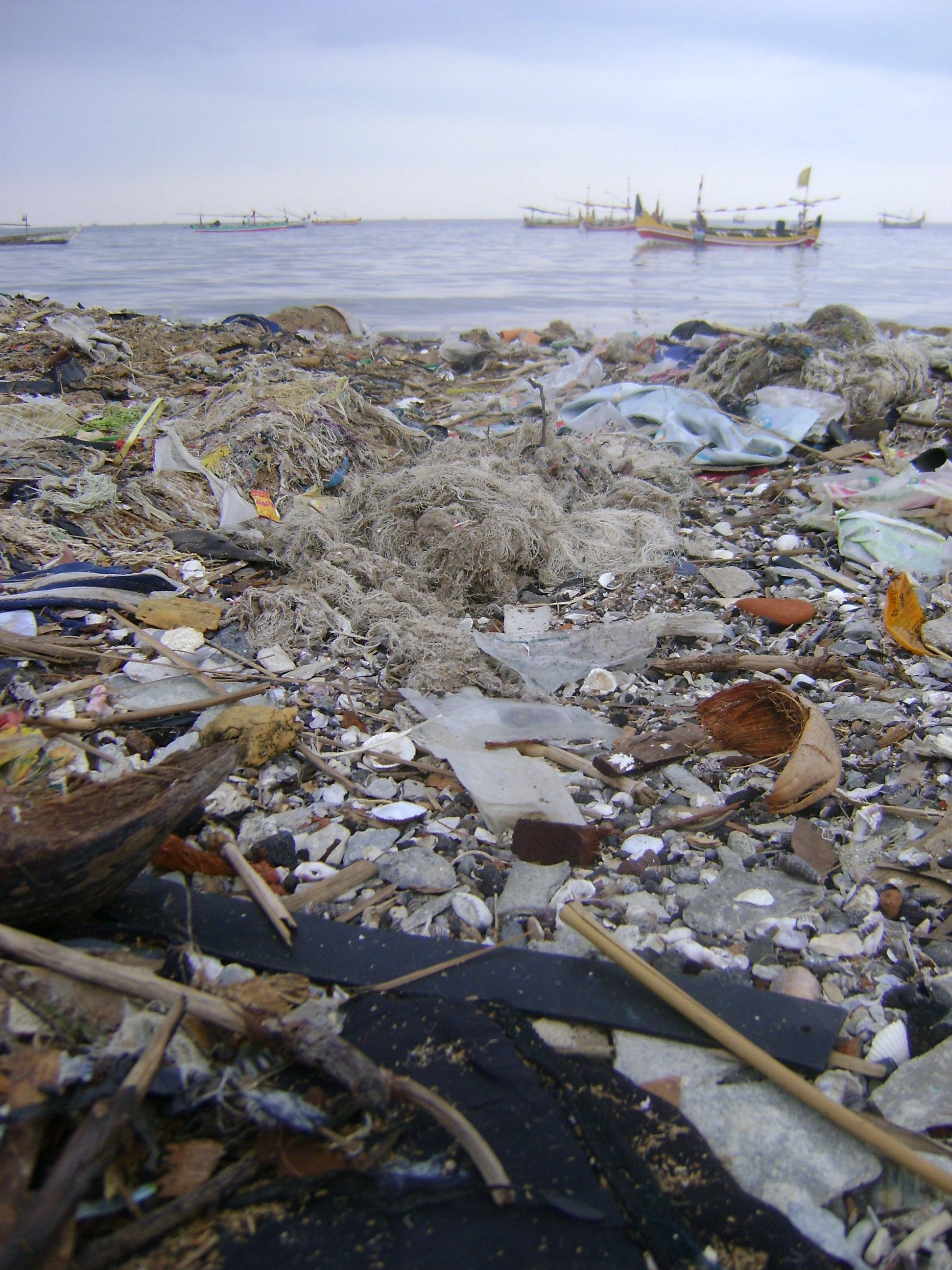 Sampah laut di Probolinggo